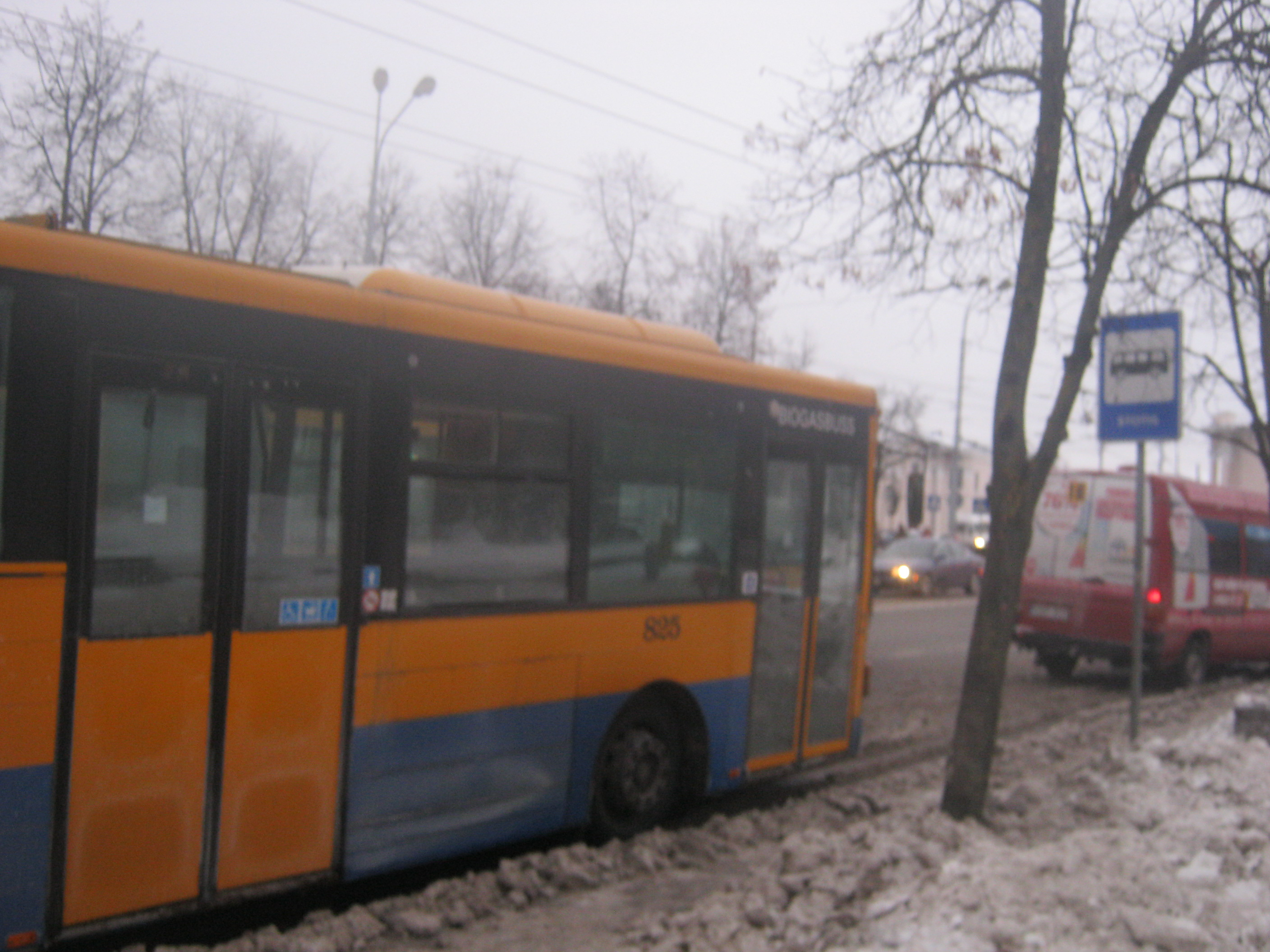 Biogas bus in Vilnius, Lithuania